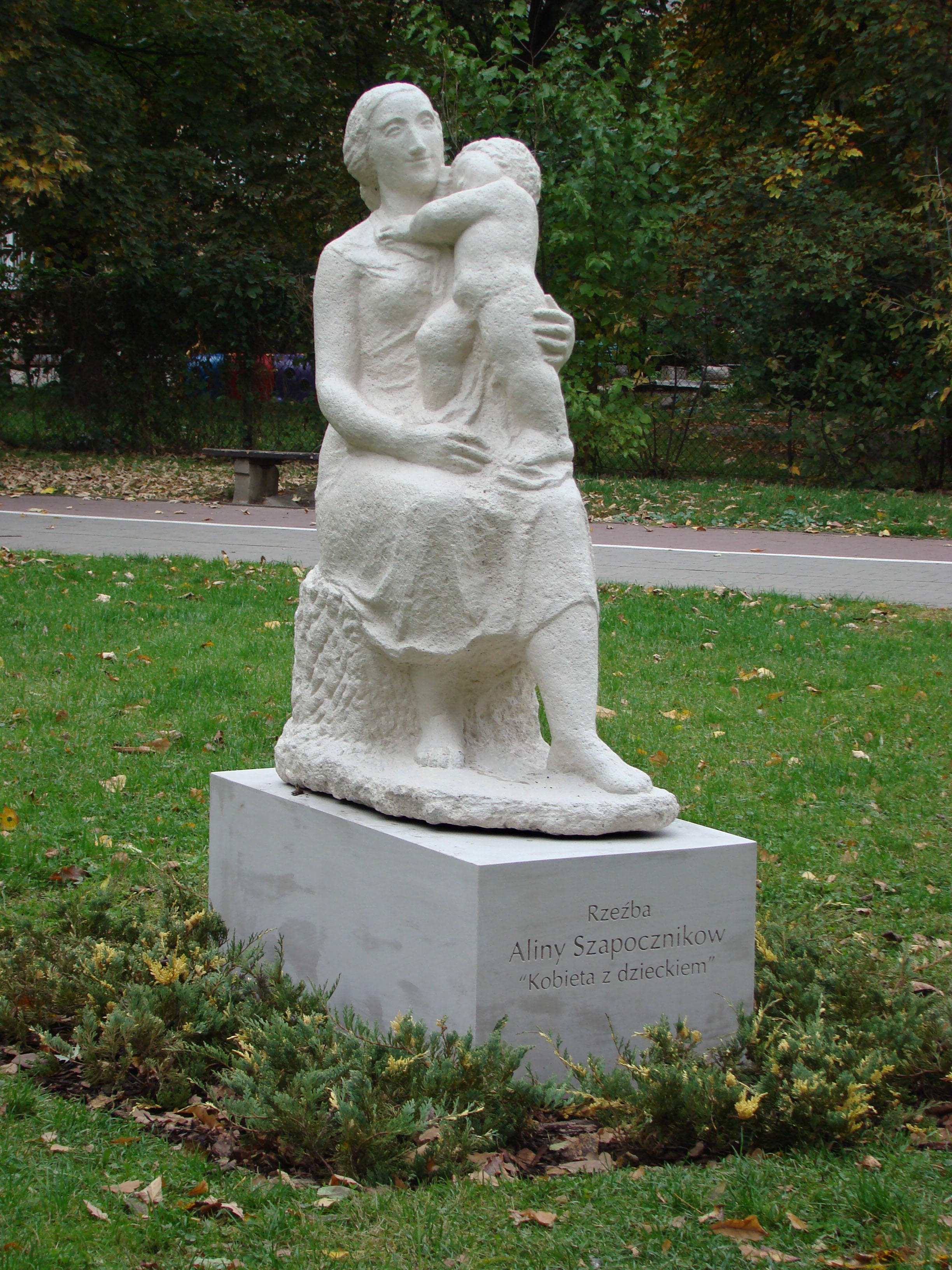 Alina Szapocznikow – Kobieta z dzieckiem – ok. 1949 – Warszawa, obok teatru Komedia